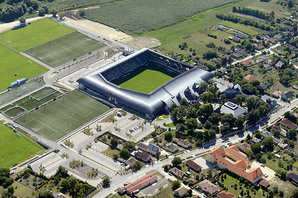 Légi fotó a felcsúti Pancho Arénáról